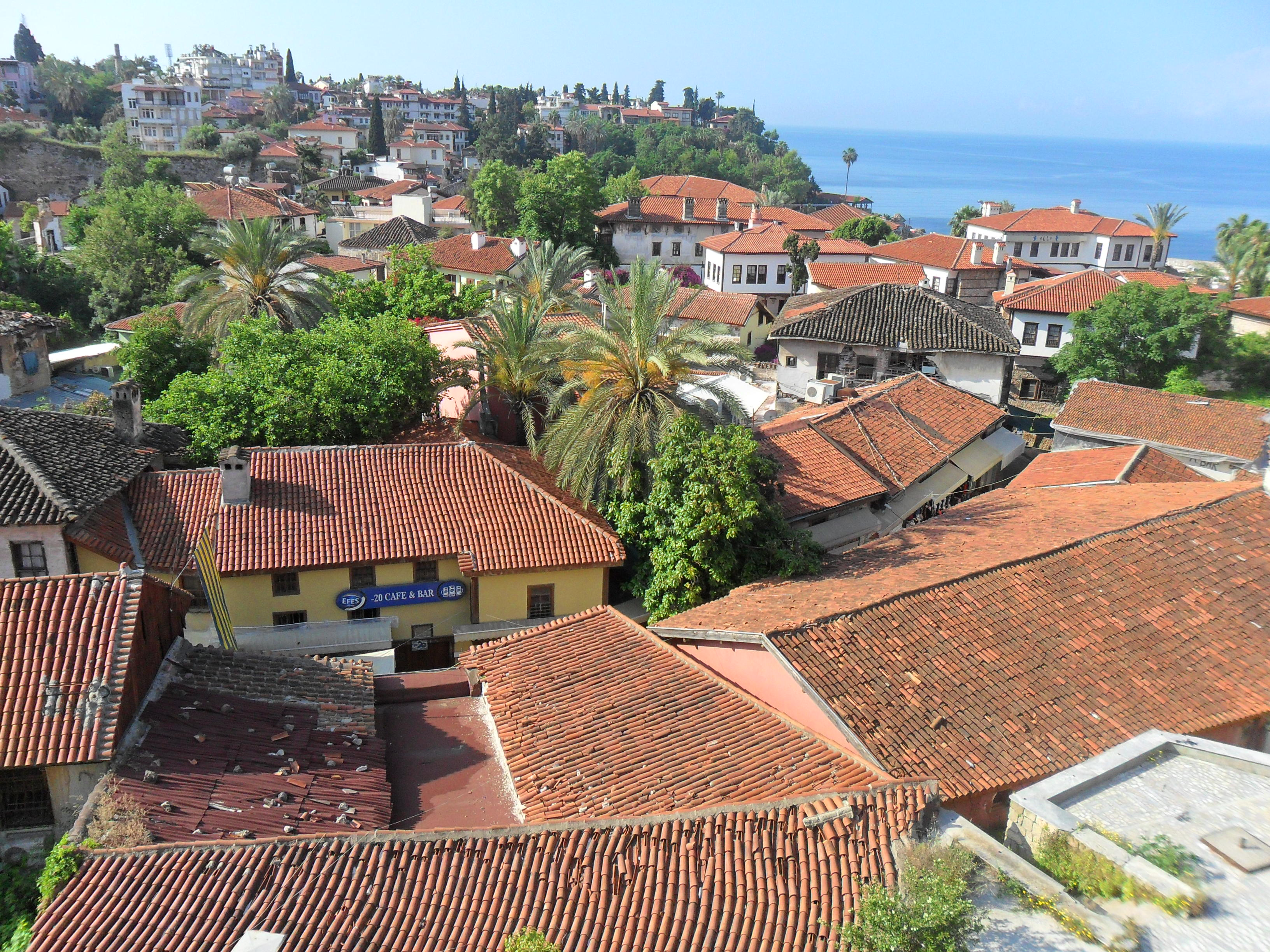 Antalya'nın tarihî merkezi Kaleiçi'nden bir görünüm.